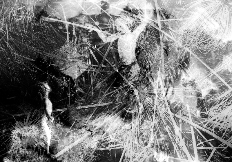 Angels, print on perspex 50x35x3 cm´, 2013, Ora Ruven art מסדרת הדפסות על פרספקס, הוצגו בתערוכה ראובן שמעון ובנימין, 2013